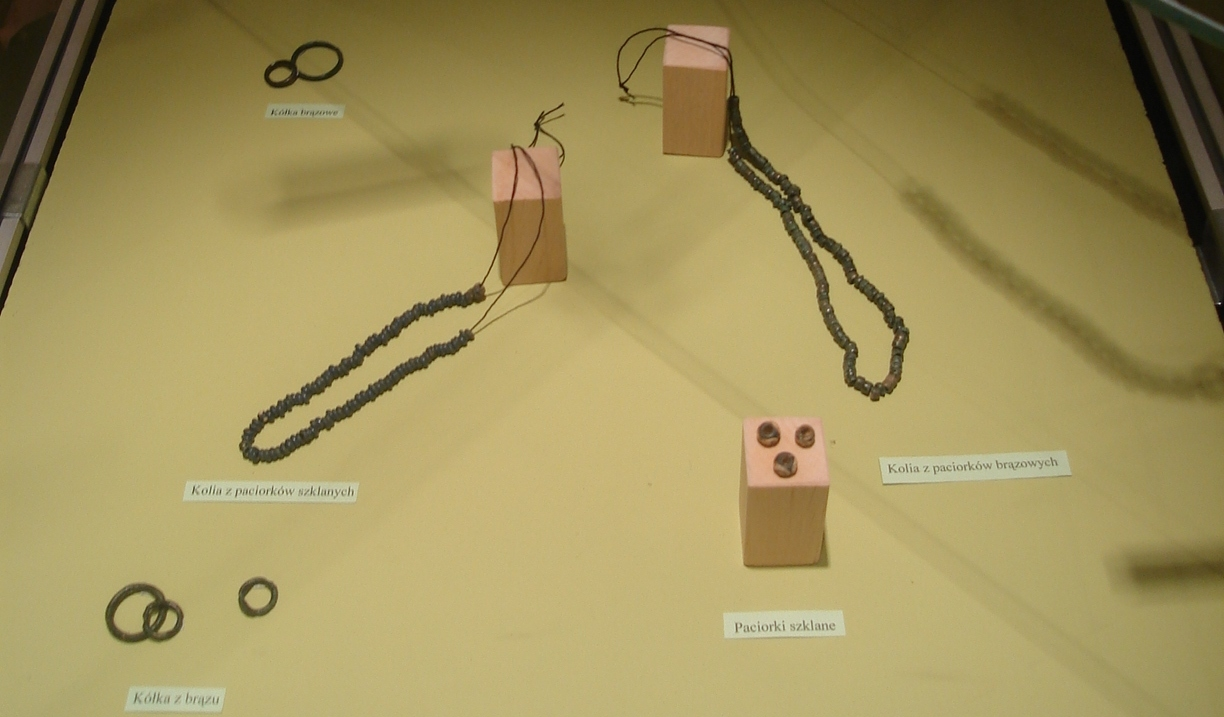 Paciorki szklane i brązowe oraz kółka brązowe.